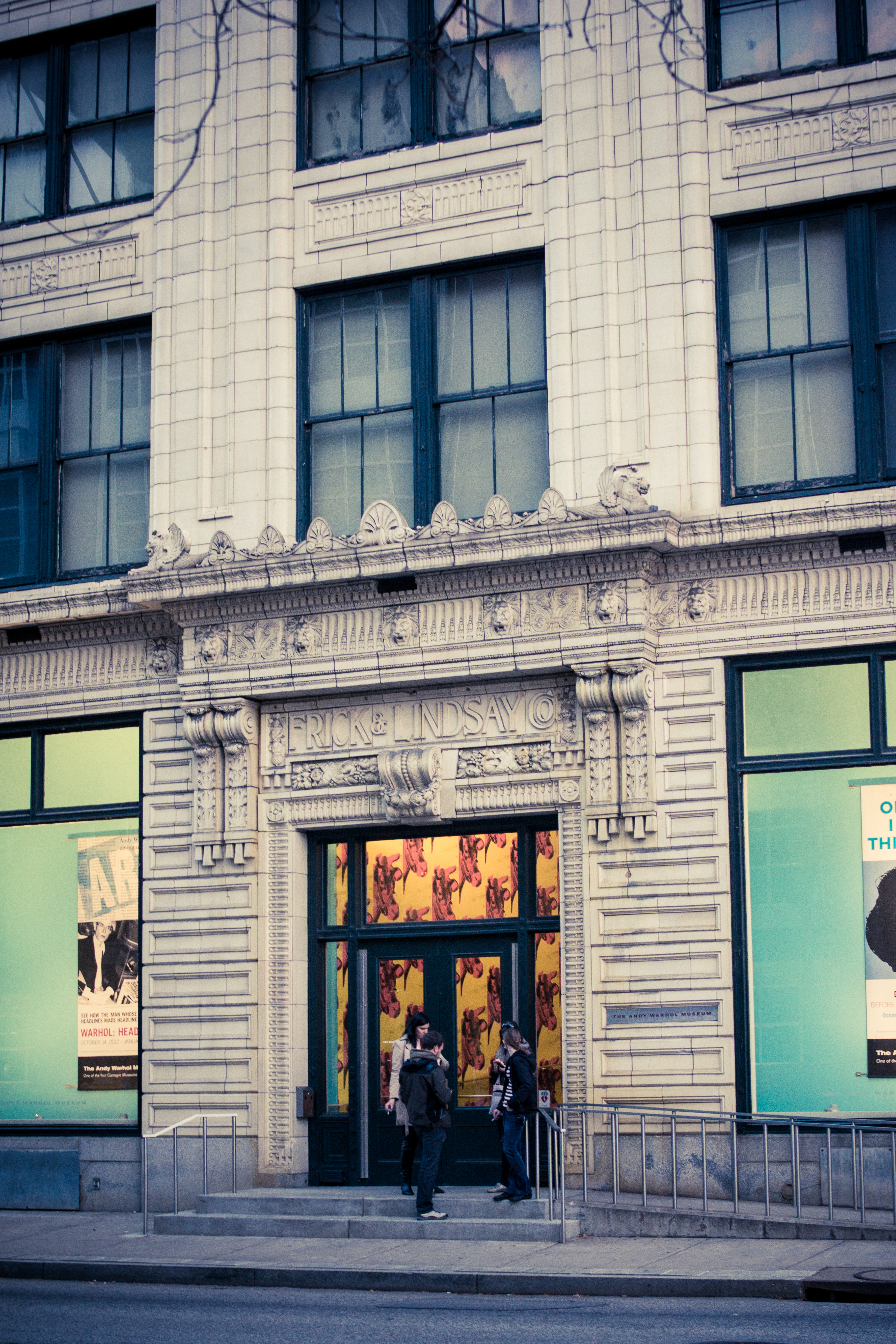 Pittsburgh, PA